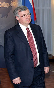 Семён Вайншток